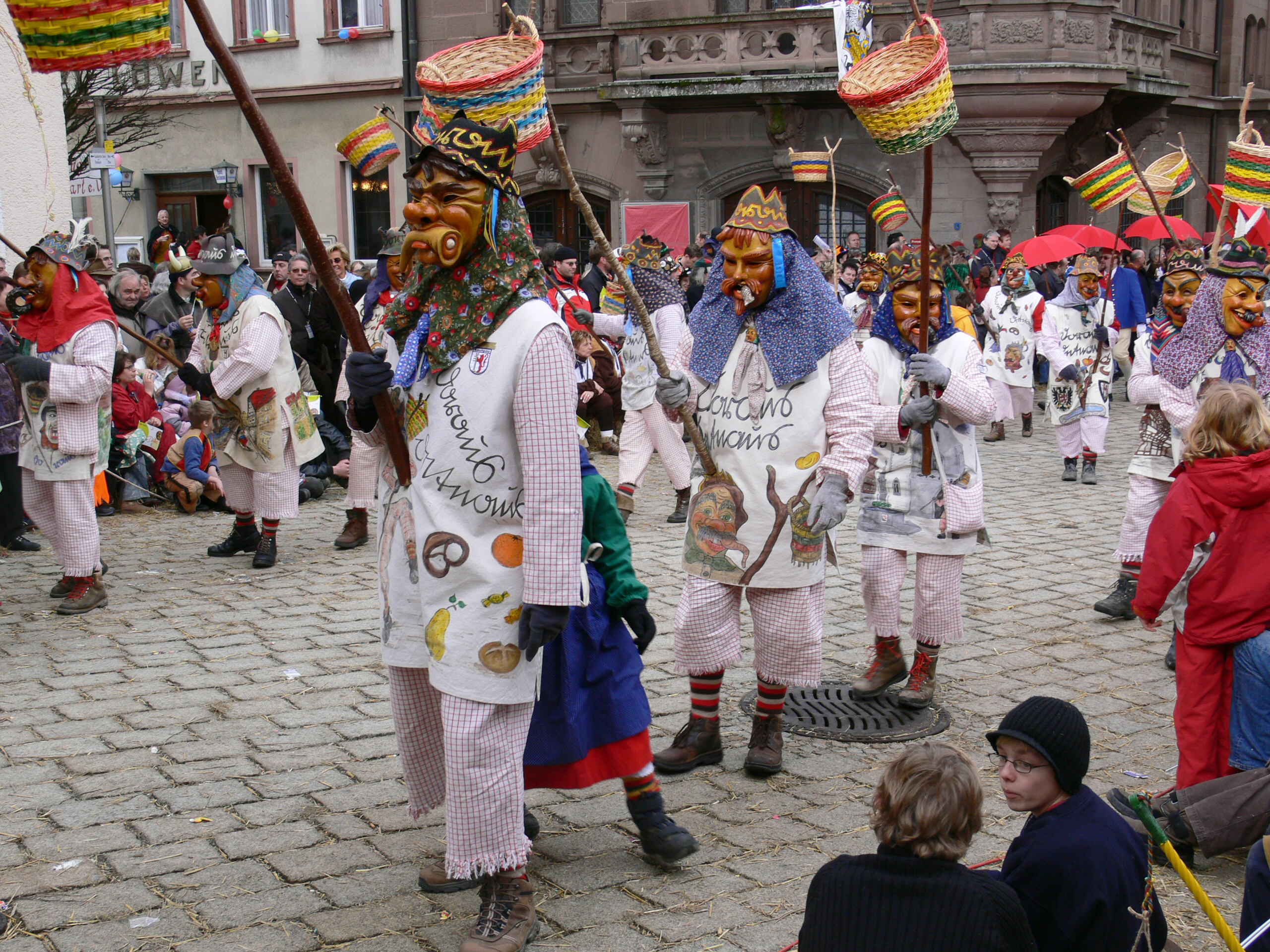 Dorauszunft Saulgau, Figur: Dorausschreier; beim Narrensprung beim Narrentreffen Meßkirch 2006